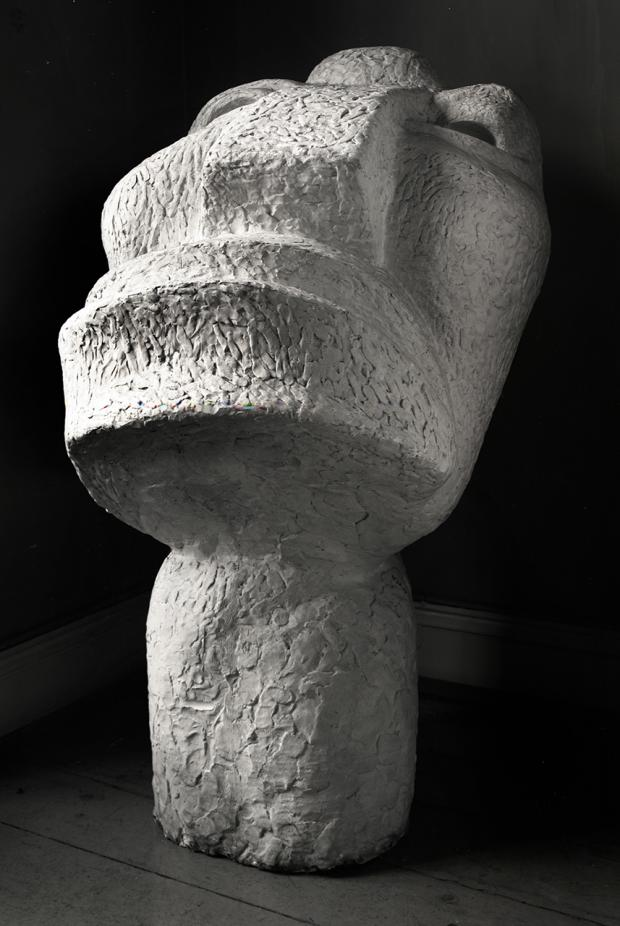 Otto Freundlich(1874-1943), Der neue Mensch, (L'Homme nouveau) 1912, plâtre. Museum für Kunst und Gewerbe Hamburg